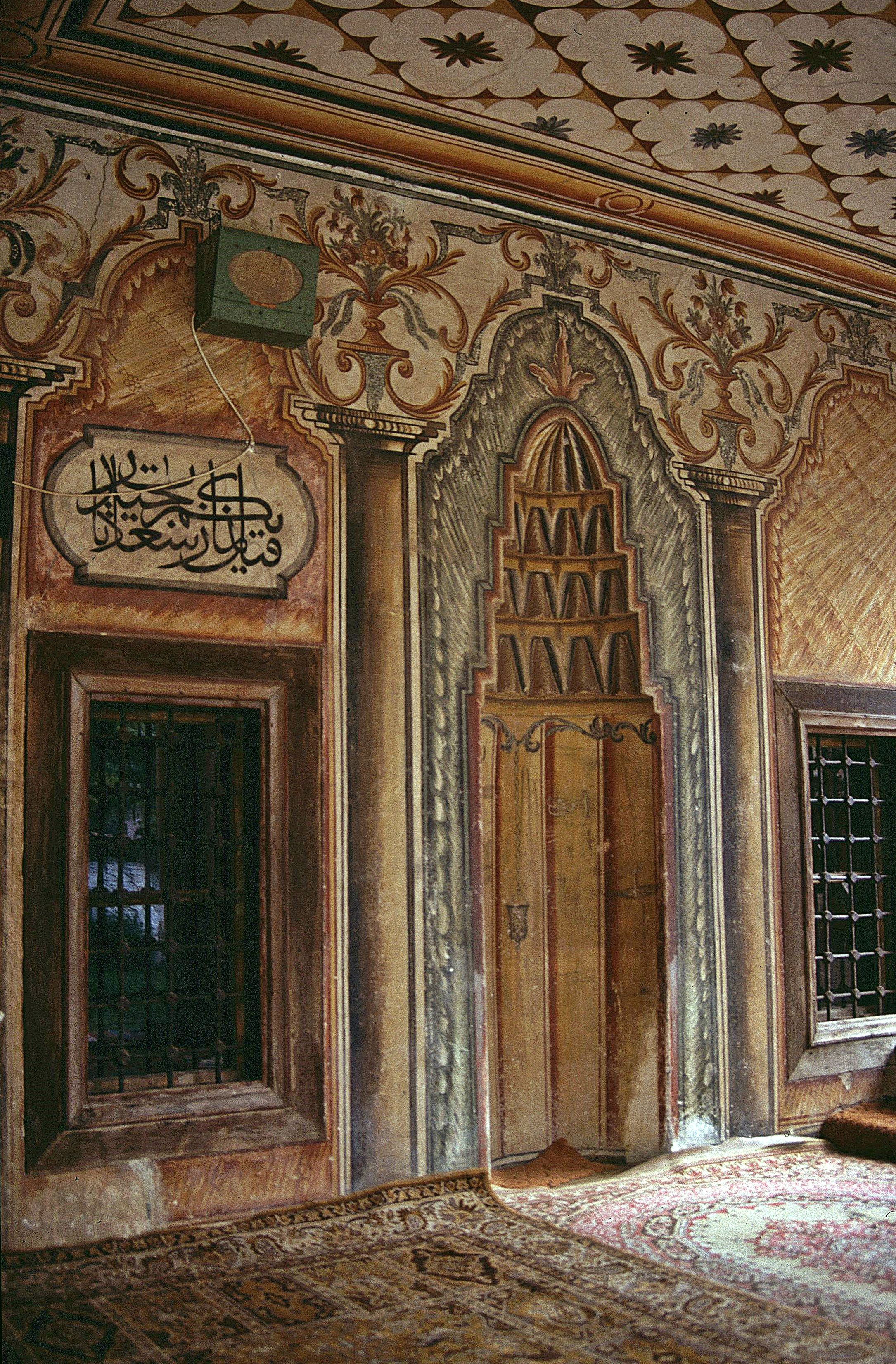 Mihrab der Bunten Moschee in Tetovo/Mazedonien